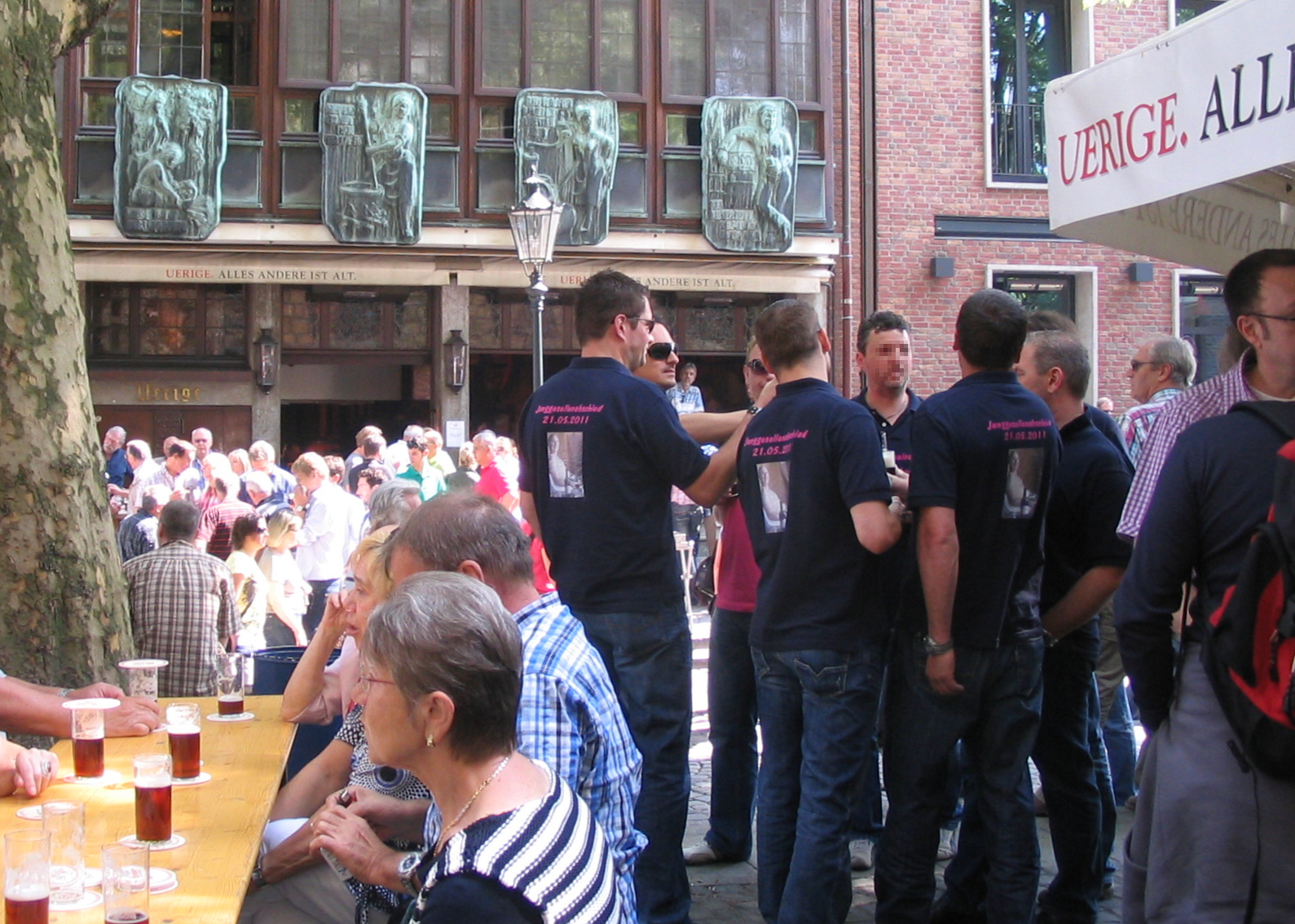 Die Düsseldorfer Altstadtkneipe Uerige an einem schönen Samstagnachmittag im Mai 2011.